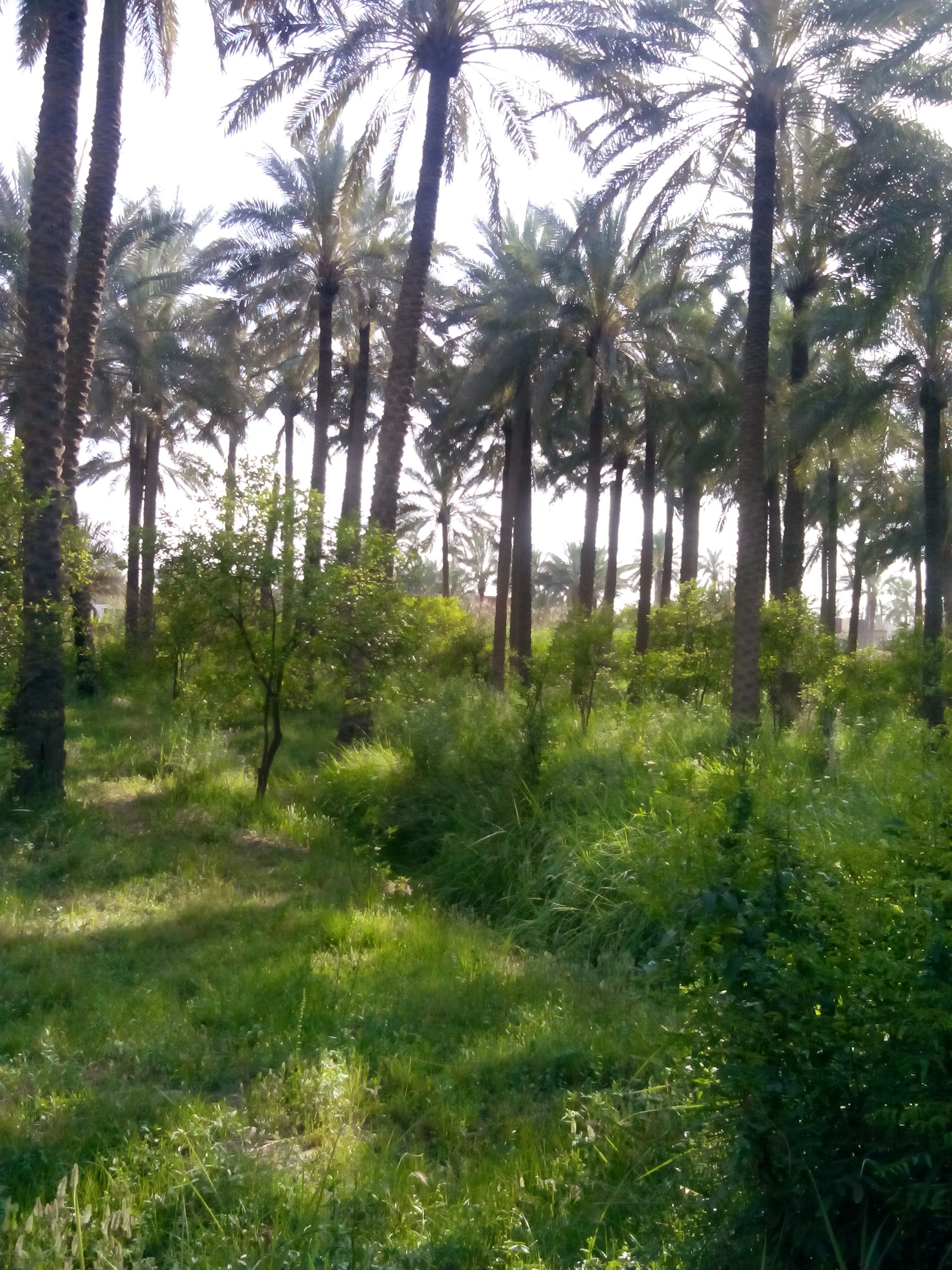 بستان نخيل في ناحية المحمودية (الأسود) التابعة لمدينة الخالص شرق العراق